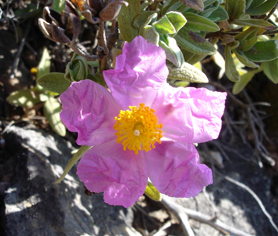 Cistus albidus (ciste cotonneux) Photo prise à Corbère-les-Cabanes le 28 mars 2005 Jean Tosti 2005